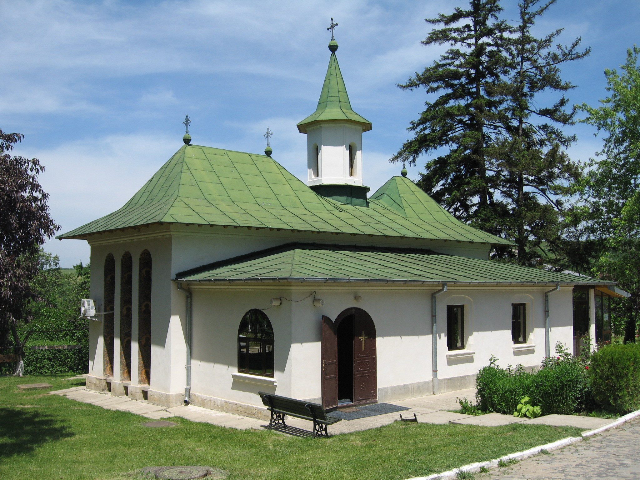 Bucium Monastery